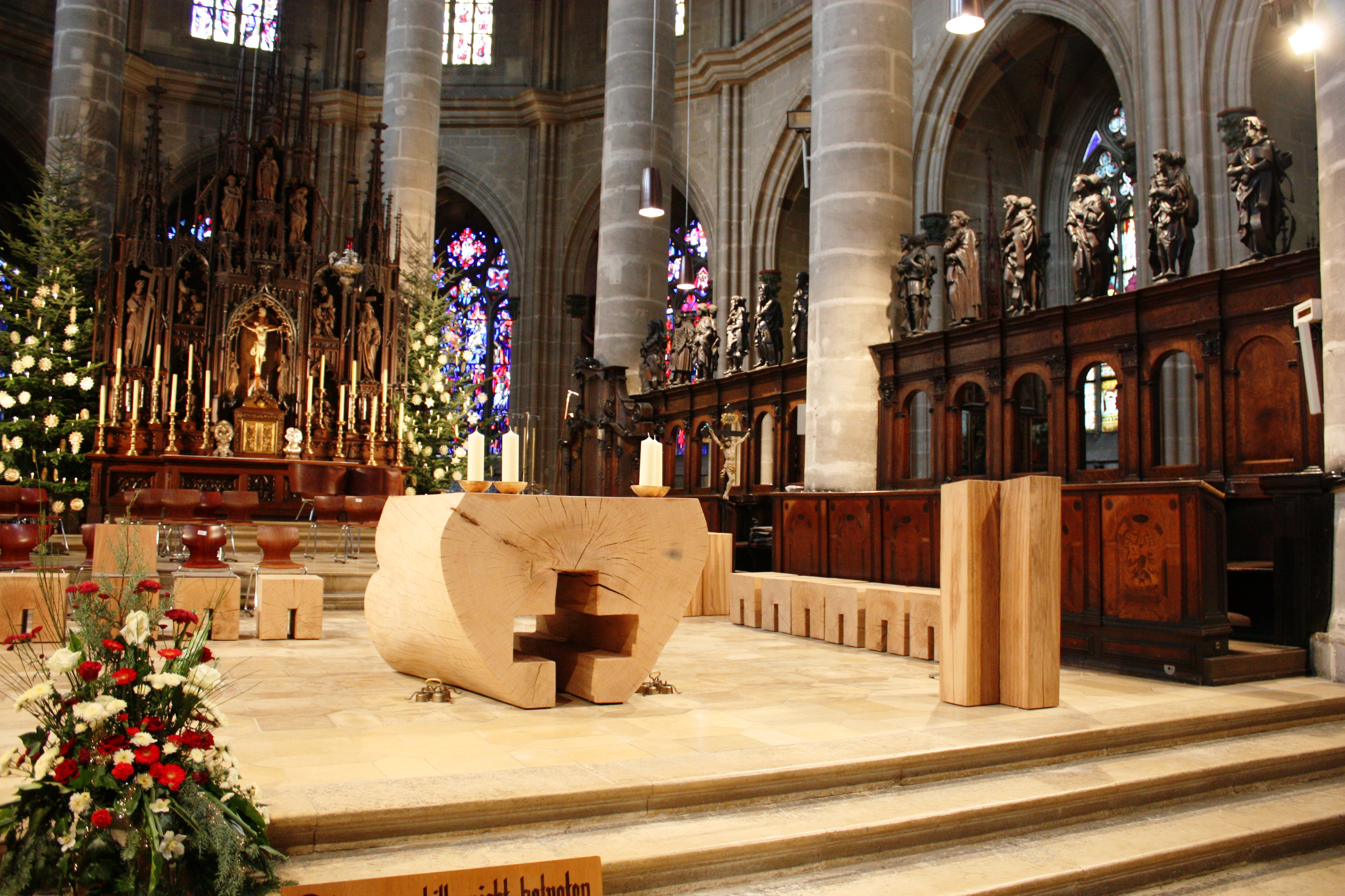 Neuer Altar im Heilig-Kreuz-Münster in Schwäbisch Gmünd von Klaus Simon aus dem Jahr 2009